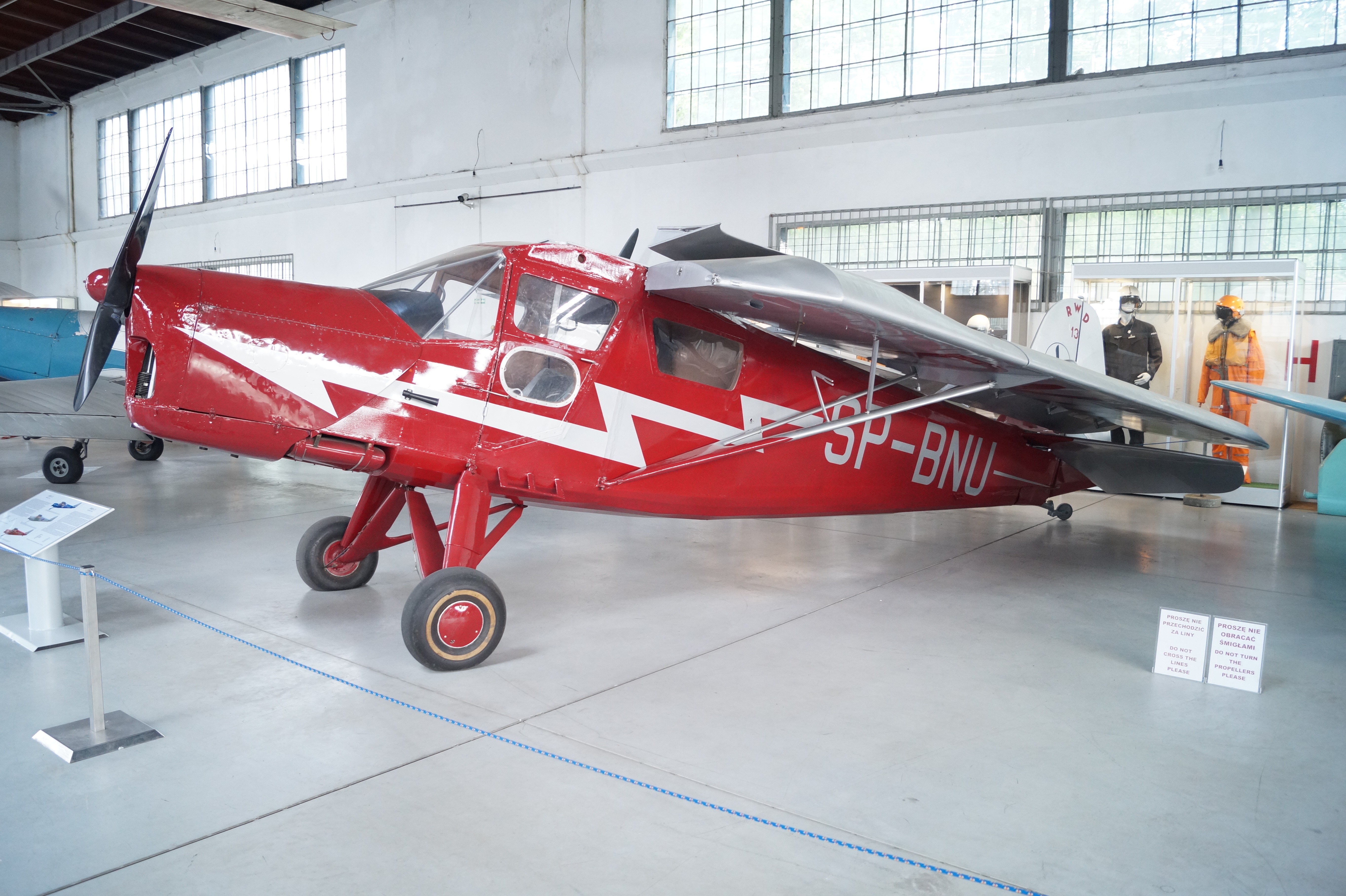 This photo was taken during Automotive Wikiexpedition 2016 set up by Wikimedia Polska Association. You can see all photographs in category Wikiekspedycja motoryzacyjna 2016. English | Polski | +/− Samolot turystyczny RWD 13 w Muzeum Lotnictwa Polskiego w Krakowie